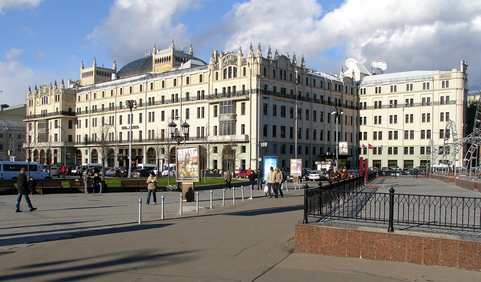 Hotel Metropol, Moscow, Russia, 1899-1907